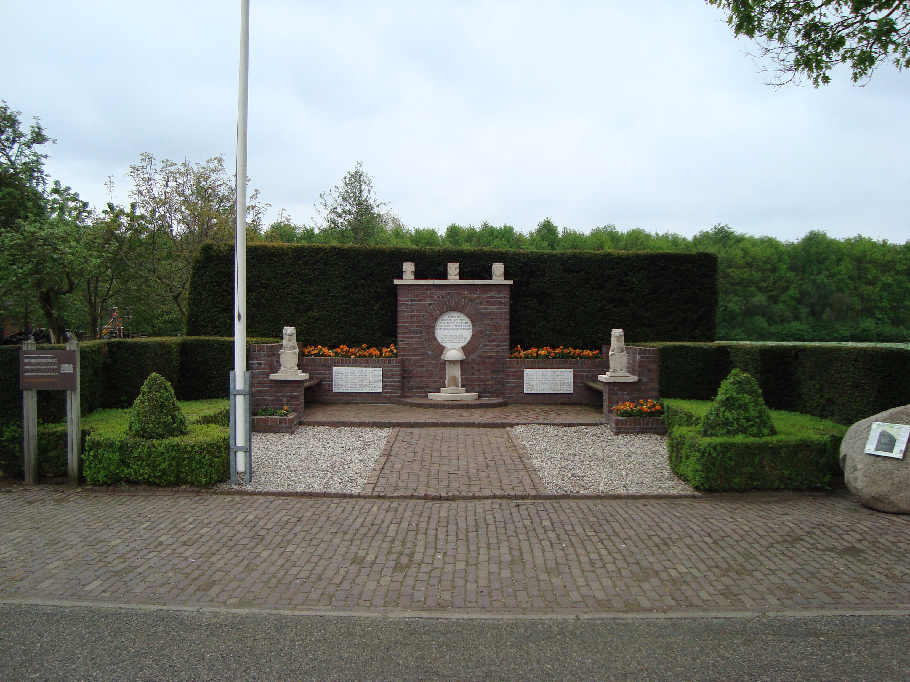 Verzetsmonument aan de Rademakersbroek Varsseveld